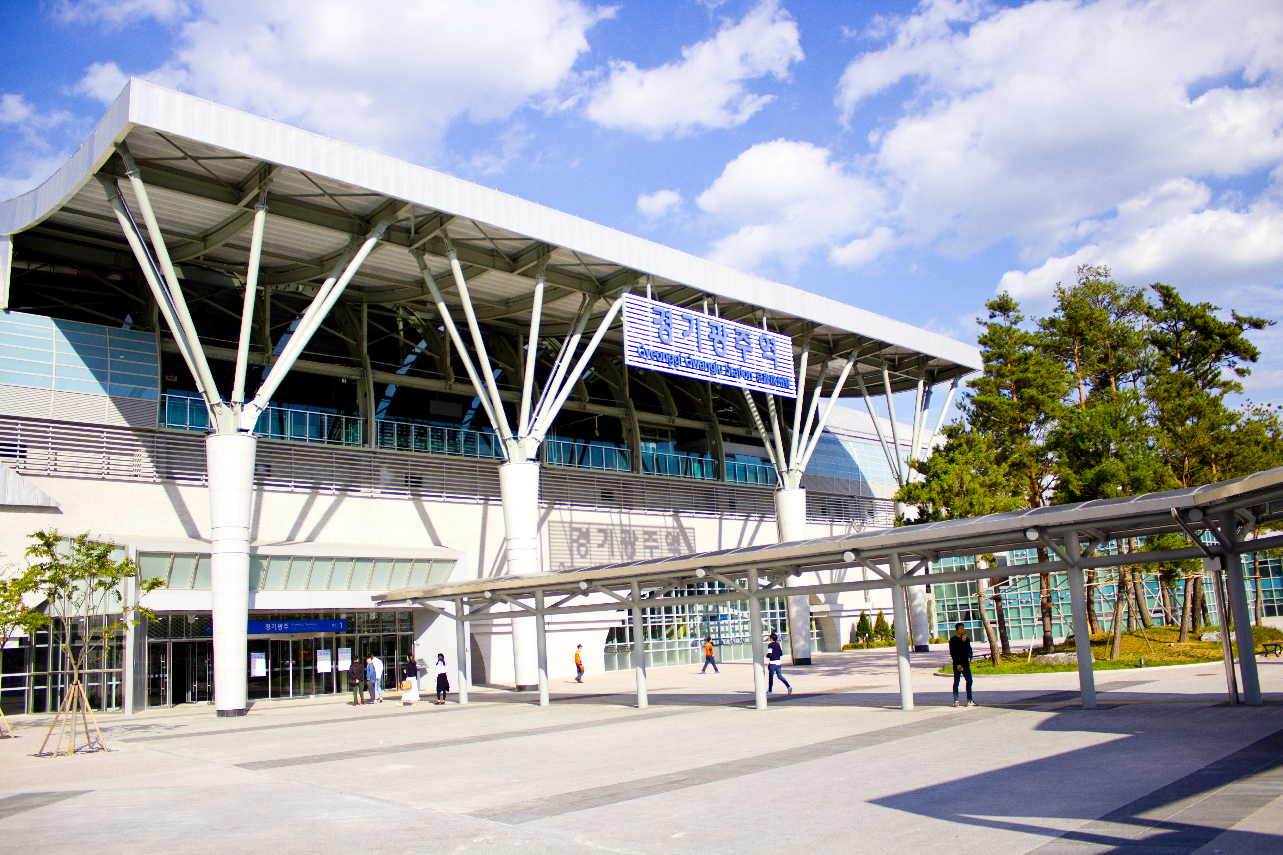 경강선 경기광주역 역사 전경